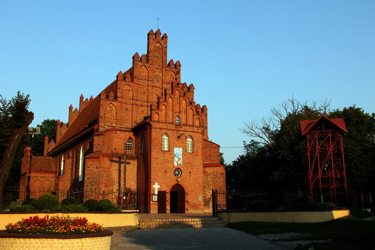 Kościół pod wezwaniem Świętego Jana Chrzciciela w Bartoszycach.